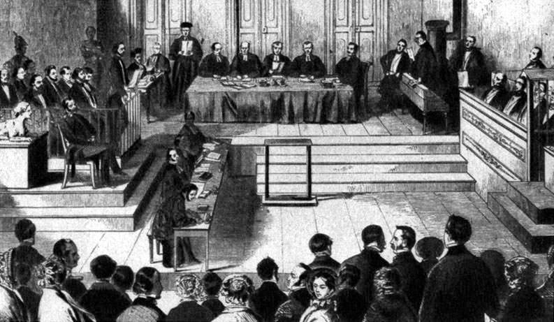 Der Kölner Kommunistenprozess von 1852. Holzschnitt nach einer Federzeichnung von J.H.M.. Erstdrúck Illustrirte Zeitung. Leipzig 20. November 1852